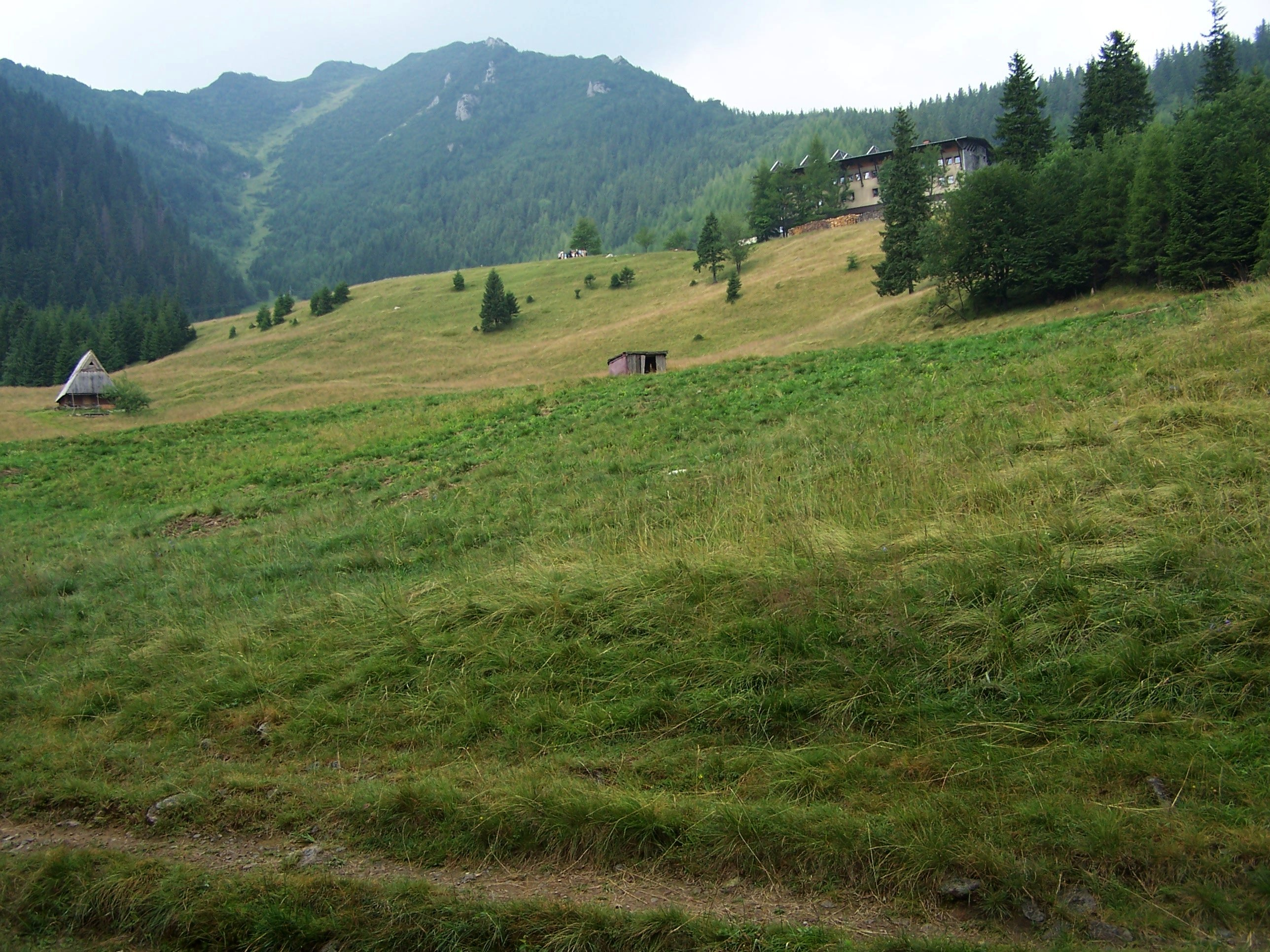 Kalatówki